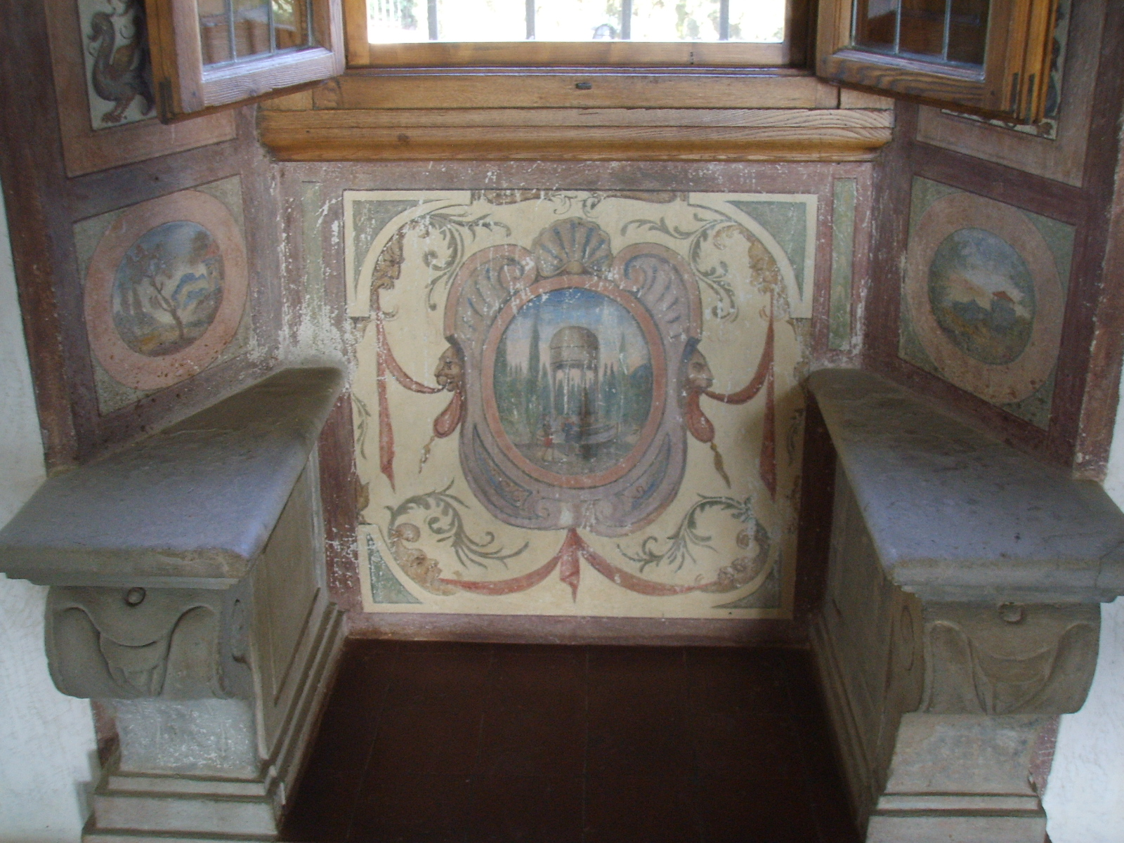 Villa il casale, affreschi